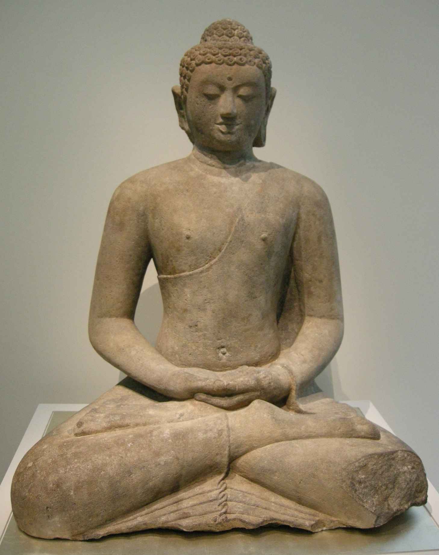 indonesia giava centrale, amitabha buddha, tardo VIII-metà del IX secolo